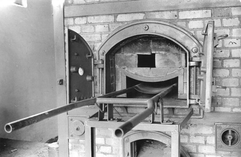 Mahn- und Gedenkstätte Ravensbrück, Ofen Zentralbild Zühlsdorf 12.8.1959 Mahn- und Gedenkstätte Buchenwald vor der Vollendung. Die Bauarbeiten an der Mahn- und Gedenkstätte Ravensbrück, die auf dem Gelände des ehemaligen Frauenkonzentrationslagers zur Erinnerung an die 92.000 von der SS ermordeten Frauen und Kinder entsteht, stehen vor dem Abschluß. Am 12. September, dem Tag der Opfer des Faschismus, wird die auf Beschluß der Tausende von Frauen aus dem Bezirken Potsdam und Neubrandenburg sowie Frauendelegationen aus zahlreichen europäischen Staaten werden zu den Einweihungsfeierlichkeiten erwartet. UBz: Einer der Öfen, in denen die Faschisten 92.000 Frauen und Kinder verbrannten. [Mahn- und Gedenkstätte für das Konzentrationslager Ravensbrück, Verbrennungsofen]